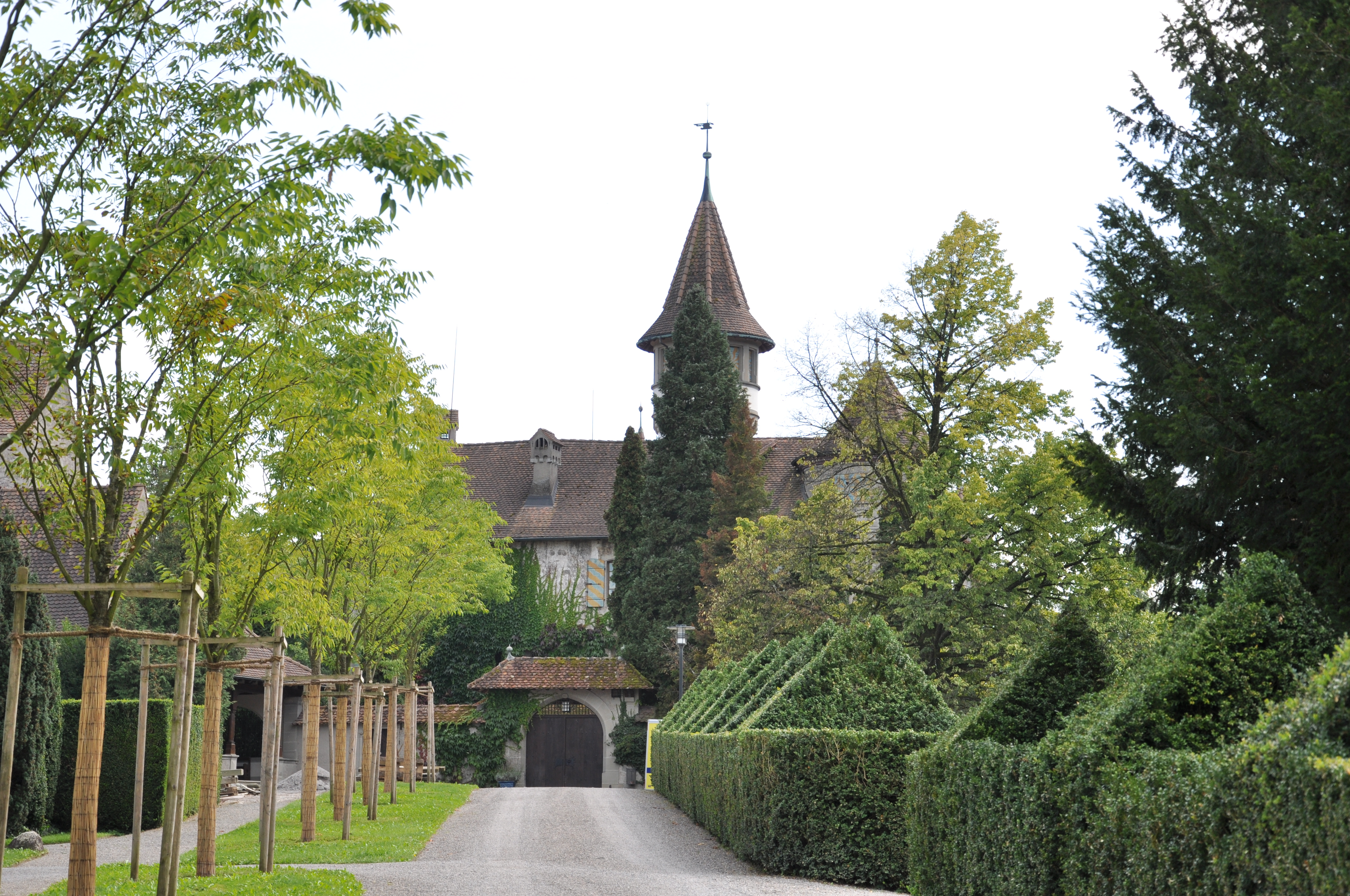 Cham: Schloss St. Andreas